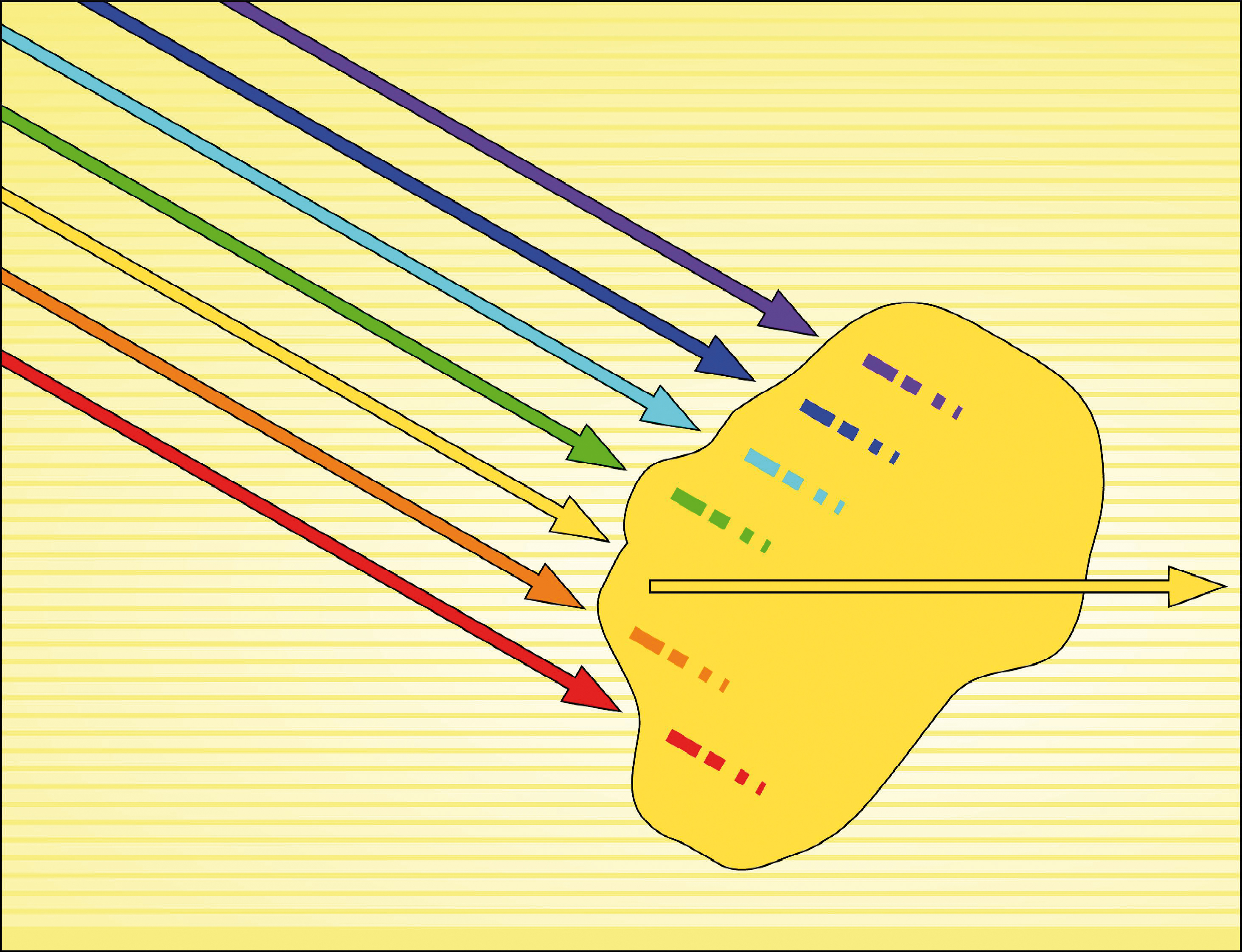 Koloreak ikusten dugu materiak zer argi espektroaren frekuentziak absorbatzen dituen arabera. Materia horiak, esaterako, hartzen du espektro osoa frekuentzia horia izan ezkik. Frekuentzia hau horregaitik gure begietara ailegatzen da.